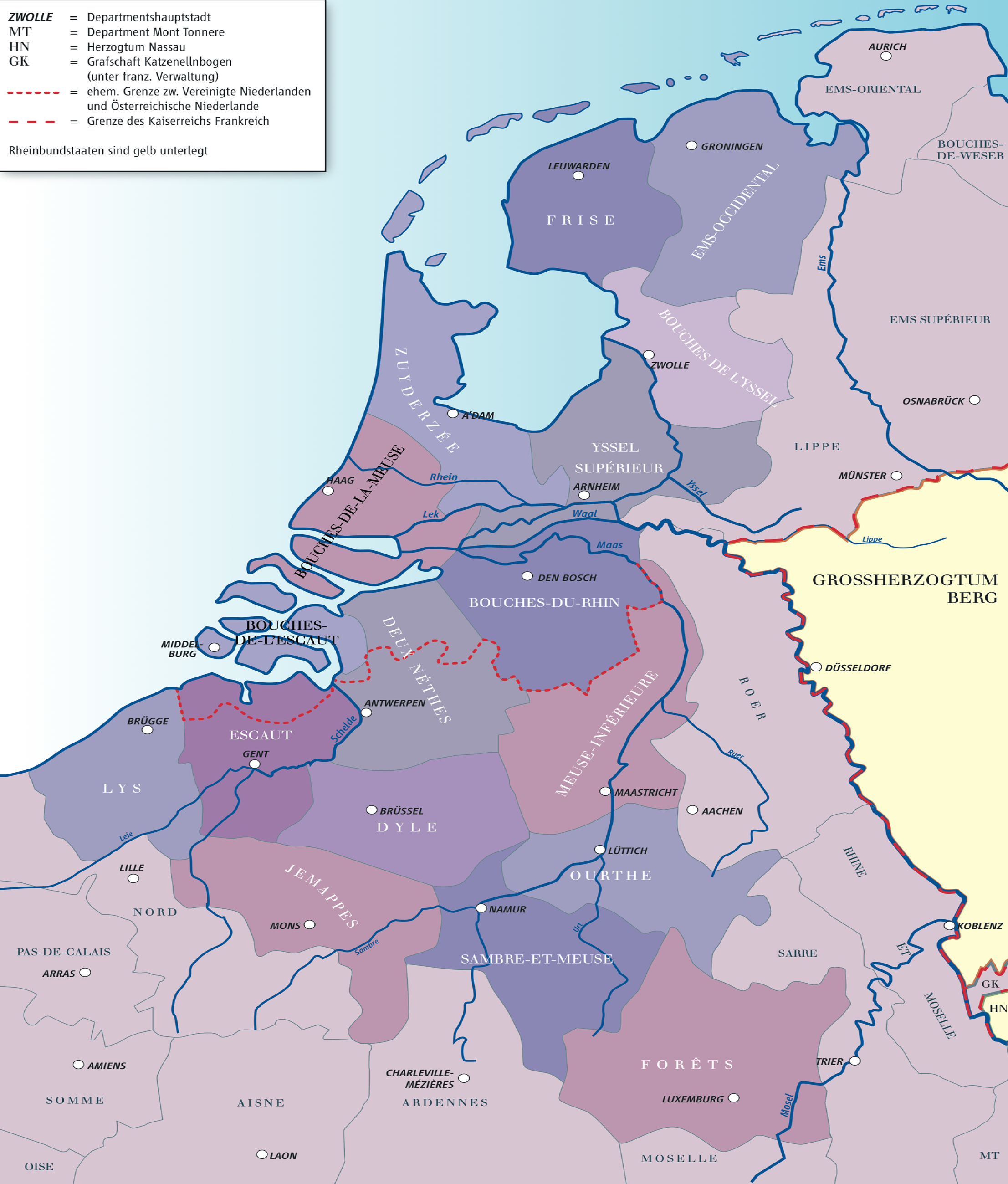 Karte der französischen Departments in den Niederlanden und Belgien (1812)